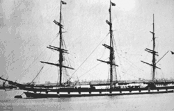 Loch Ard (1873-1878)